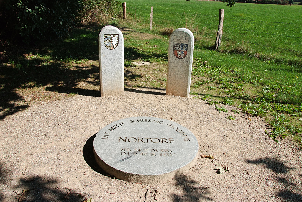 In Nortorf, Ortsteil Thienbüttel, befindet sich der geographische Mittelpunkt Schleswig-Holsteins